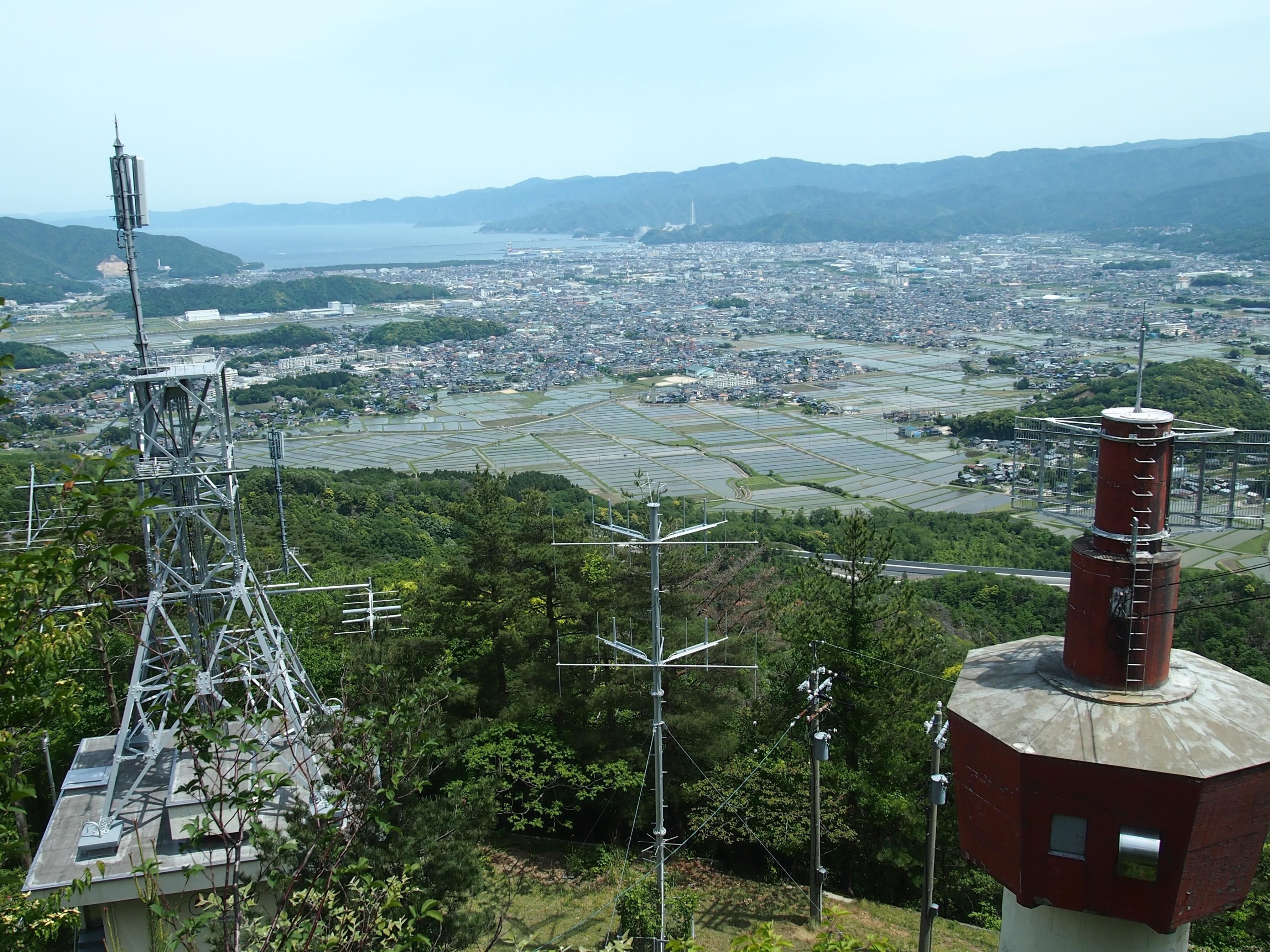 野坂岳のテレビ塔（福井県敦賀市）